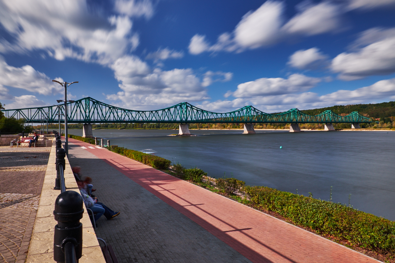 Bulwary im. Marszałka Józefa Piłsudskiego, Włocławek